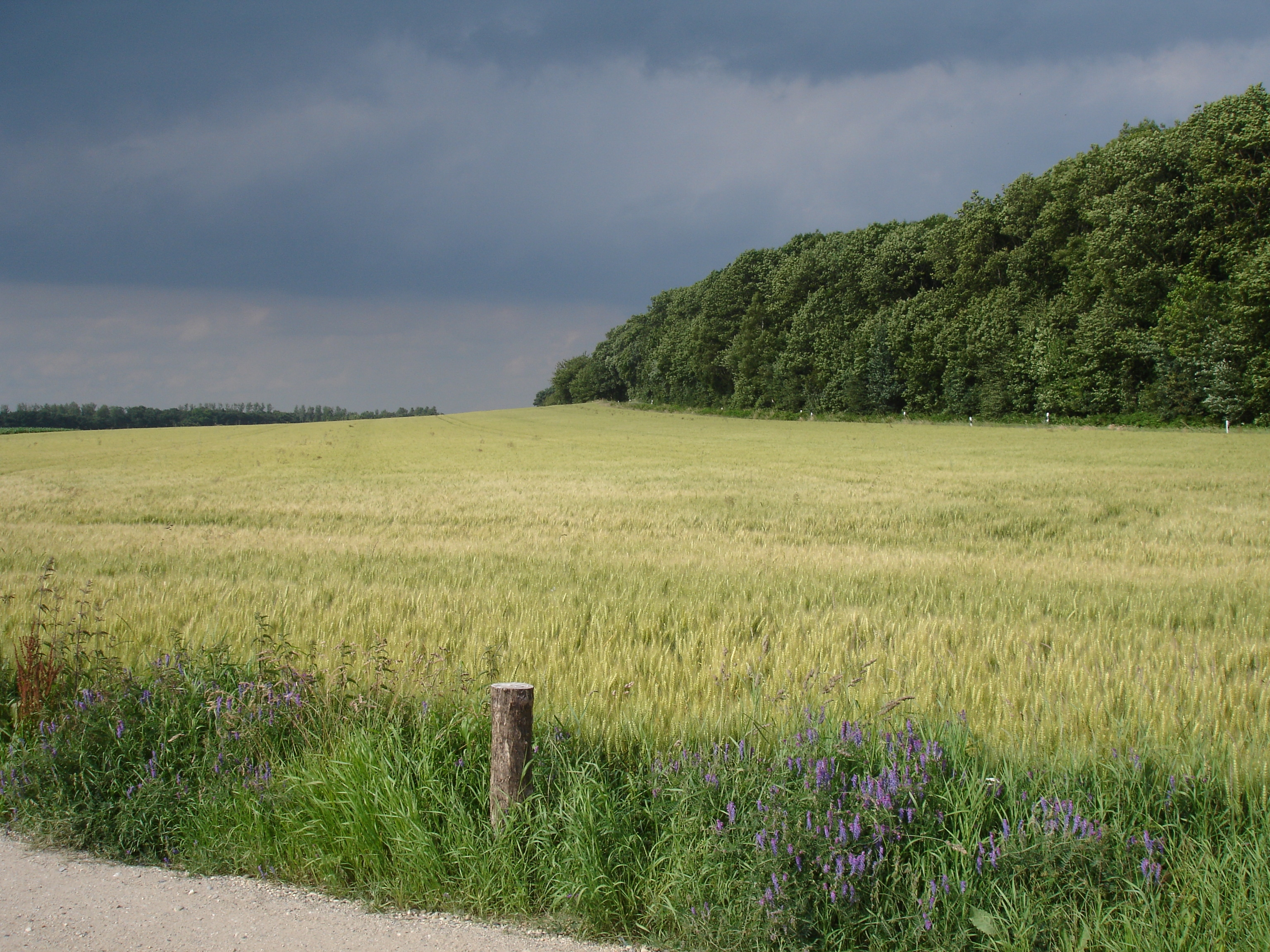 Blick in nordöstliche Richtung von der Ketelstraat in Groesbeek (Niederlande) über ein Feld zur Grafwegener Straße in Kranenburg (Deutschland; Straßenverlauf entspricht etwa der Staatsgrenze) und zum Rand des Klever Reichswalds (hier Westrand des Drüller Bergs; Wald im Landschaftsschutzgebiet „Waldgebiet Reichswald“)